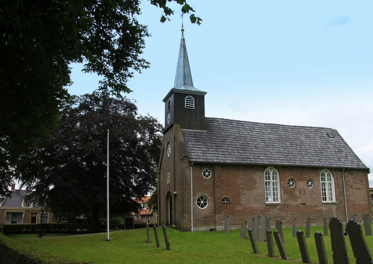 De Hervormde kerk van Tjalleberd uit 1742. Het streekdorp Tjalleberd ligt in de Gemeente Heerenveen De Kerk staat op de hoek van de Pastorie Singel en de Aenwerderweg.